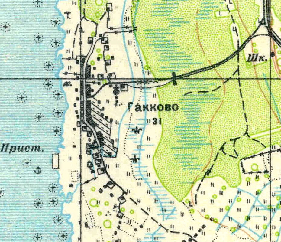 Топографическая карта Ленинградской области, квадрат О-35-21-А-а (Кирьямо), деревня Гакково.